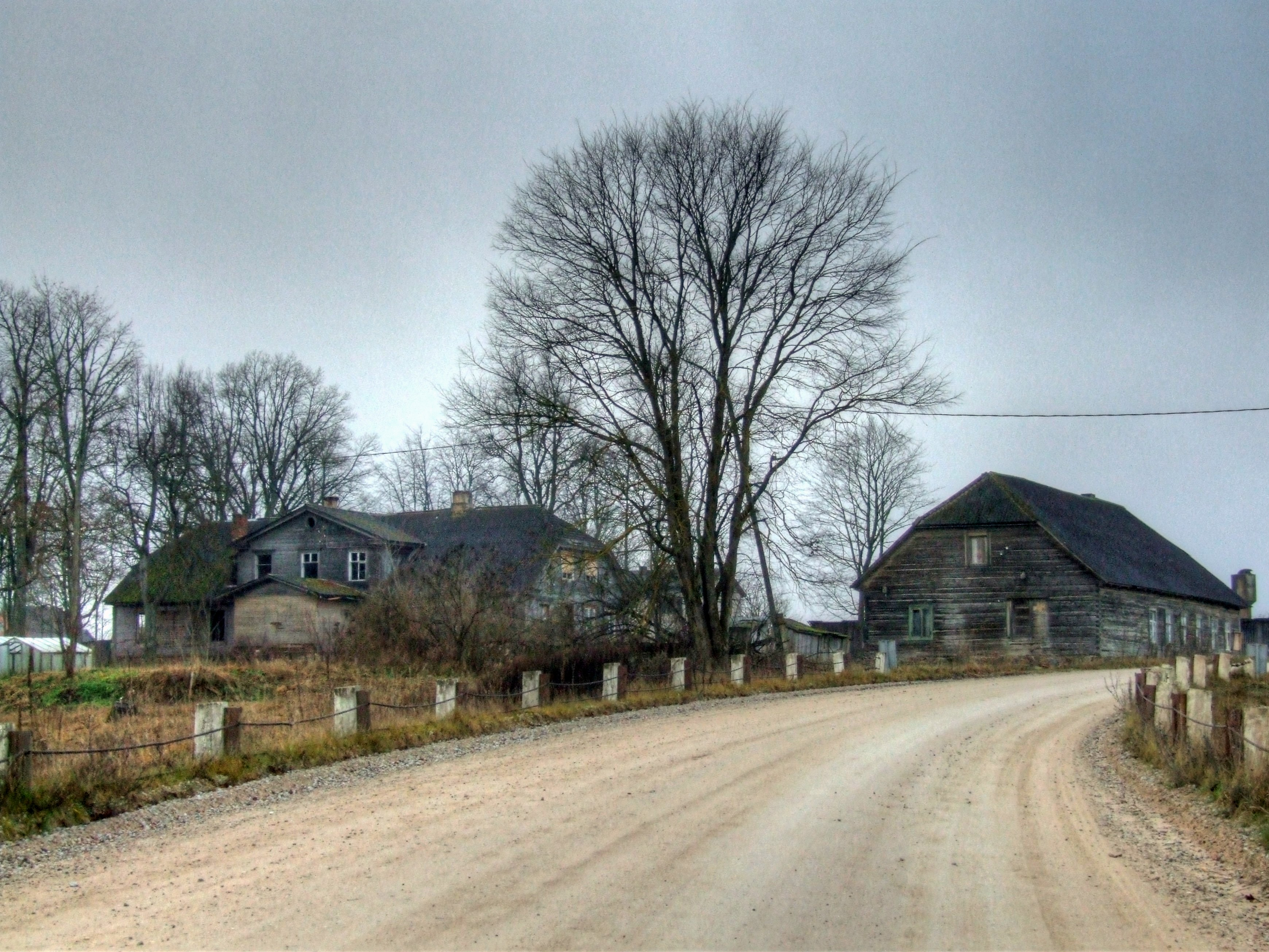 Vidzeme